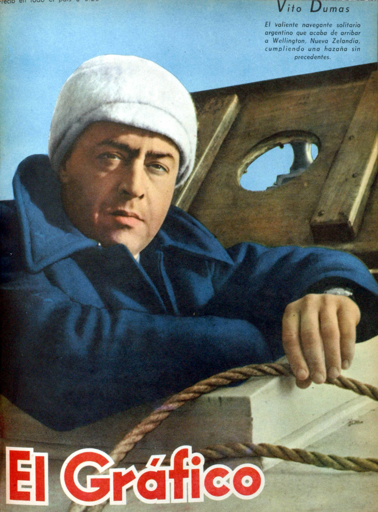 El Grafico del 15 de Enero de 1943. Edicion 1227